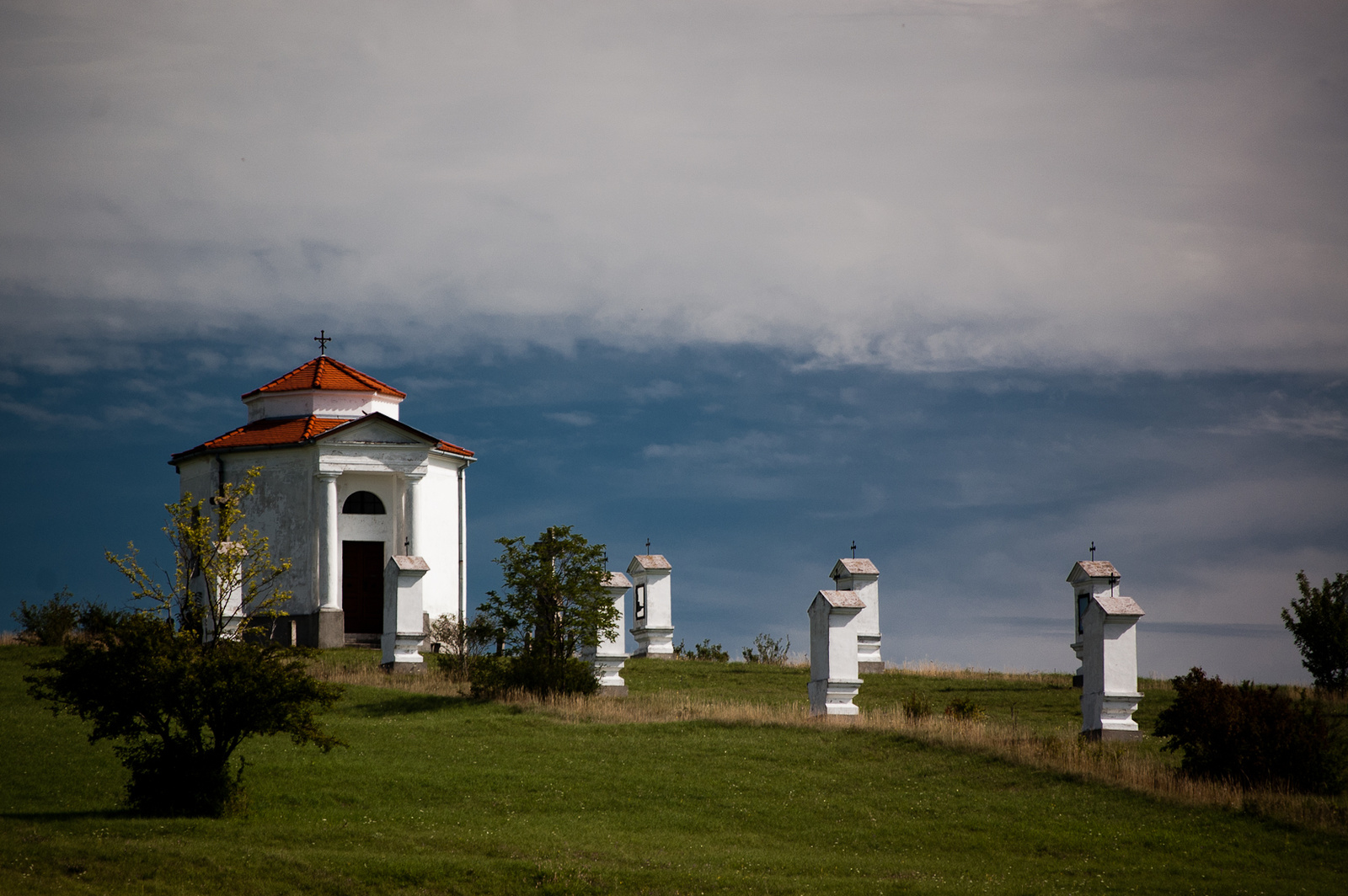 Kálvária kápolna (Vöröstó, )